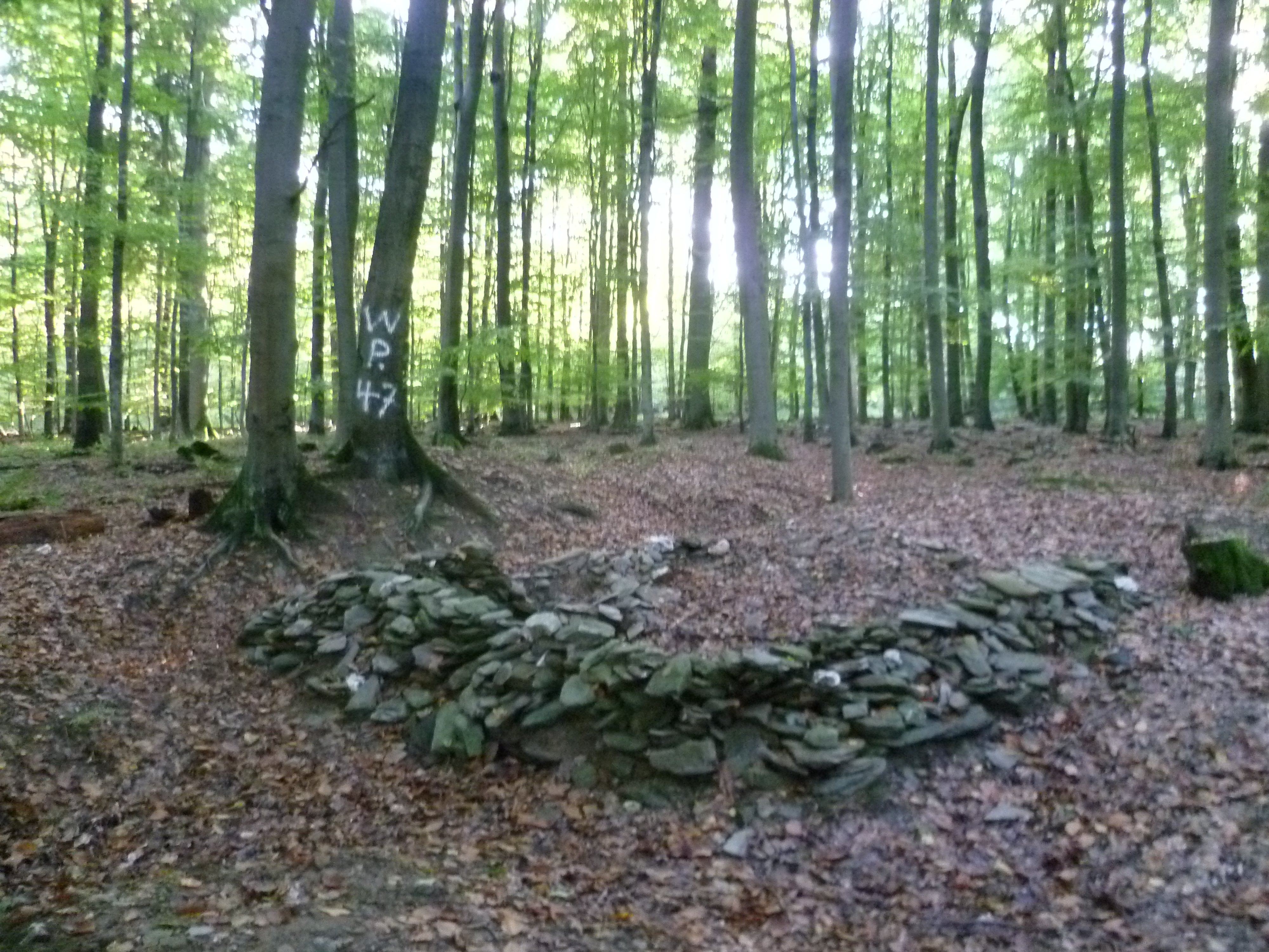 Limes-Wachposten 2/47 am Römerrundweg Heidenrod-Huppert.